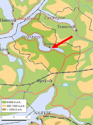 Lagekarte der Årsteinbrua